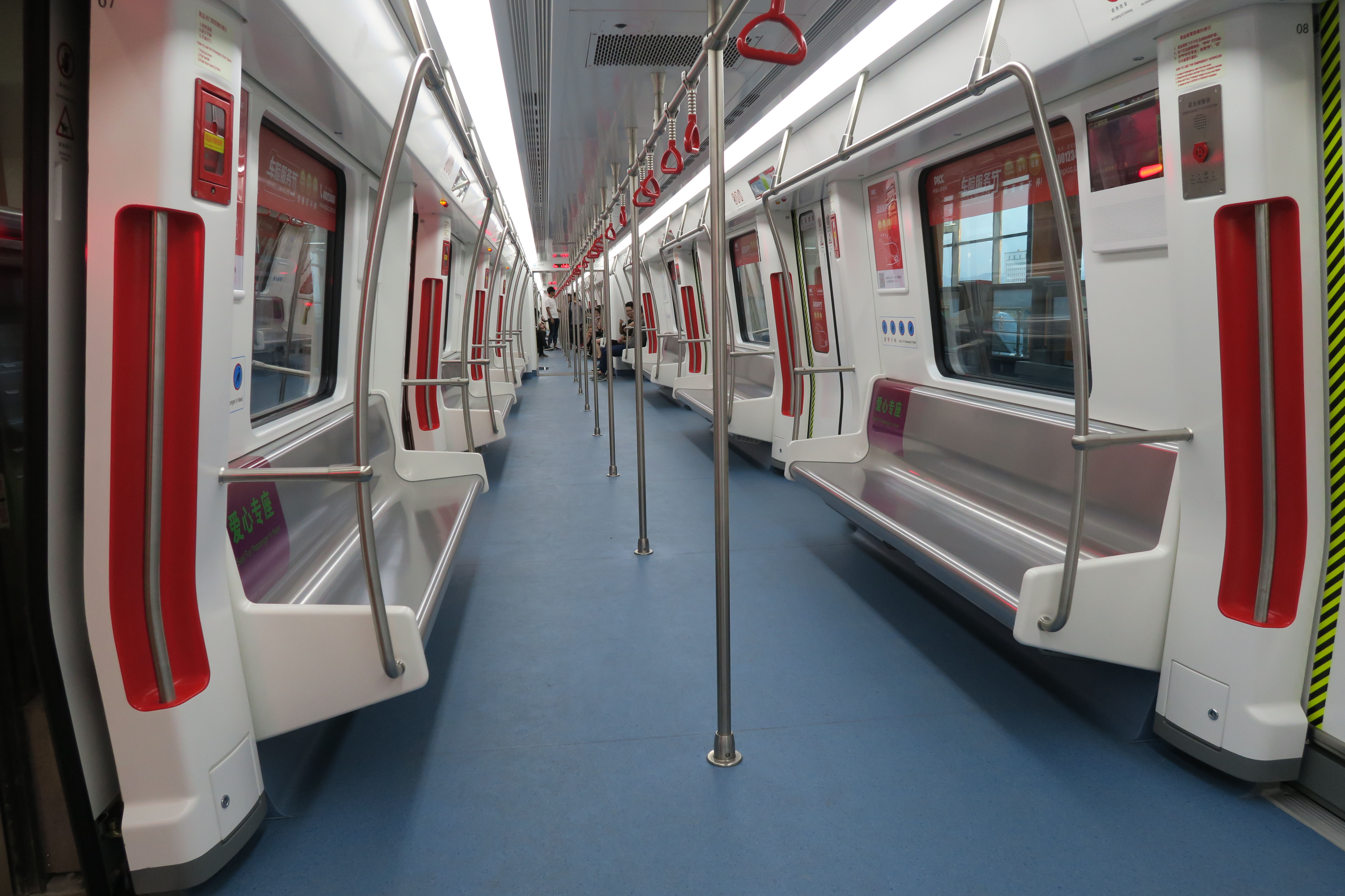 宁波轨道交通2号线一列列车内